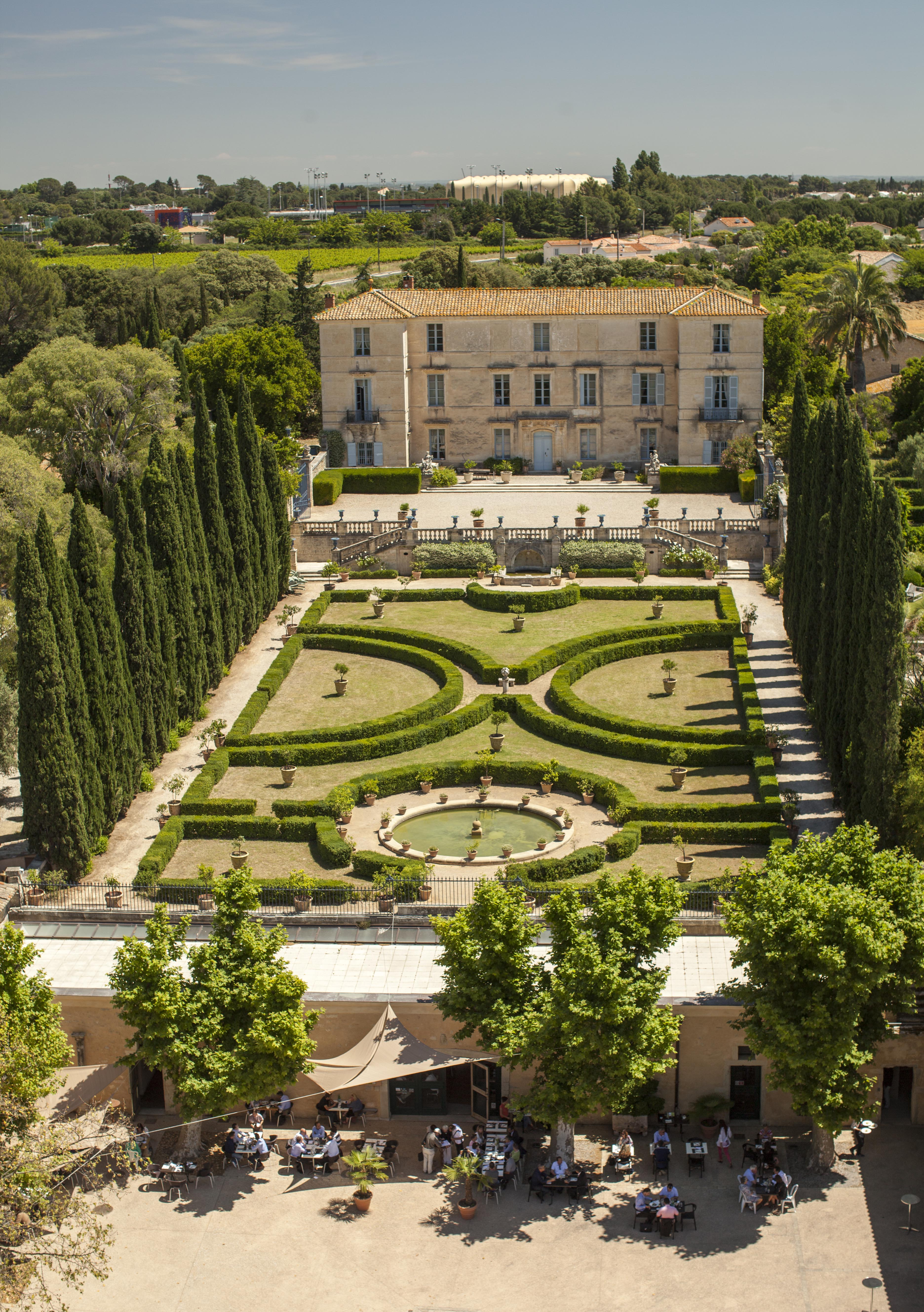 Vue d'ensemble Château de Flaugergues